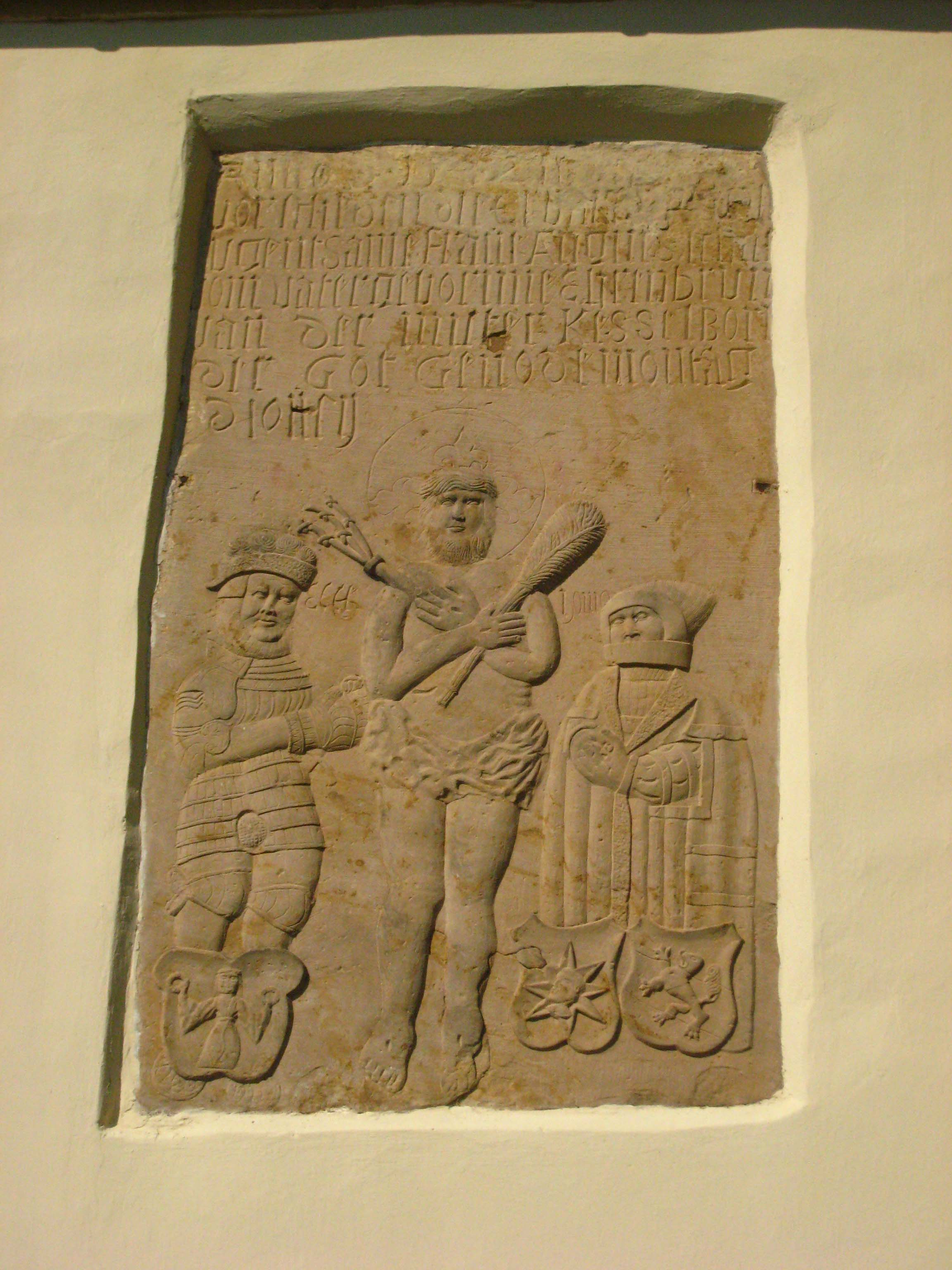 Stifterfiguren Asmus Schade und seine Frau Agnes Brun anlässlich deren Eheschließung